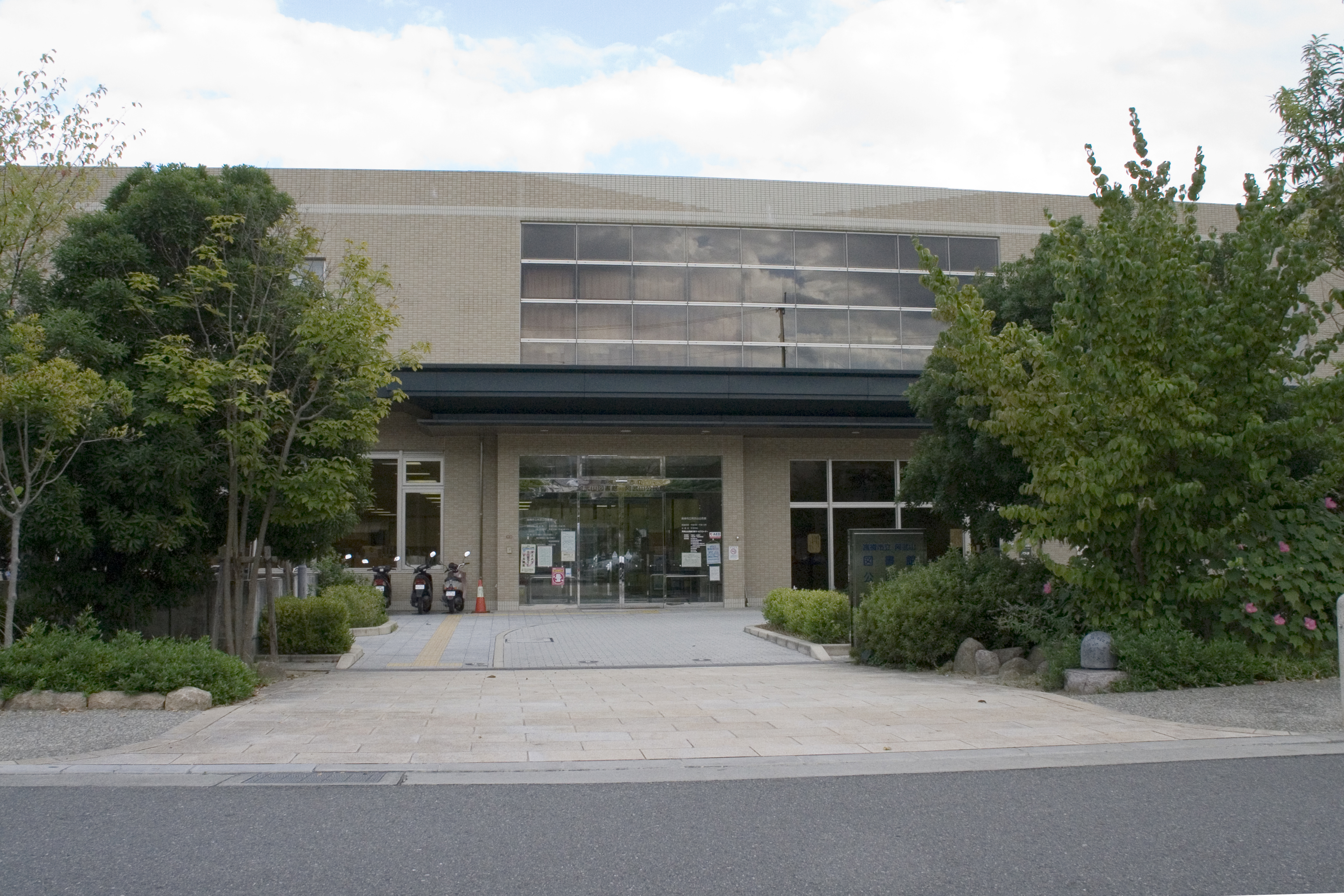 高槻市立阿武山図書館